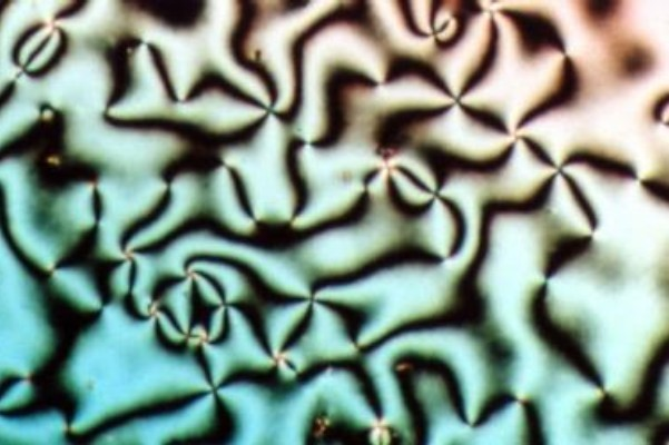 Schlieren-Textur der nematischen Phase eines kalamitischen Flüssigkristalls – 1,5-Hexandiol-bis{4-[4-(4-n-octyloxy-benzoyloxy)benzylidenamino]benzoat} bei 250 °C